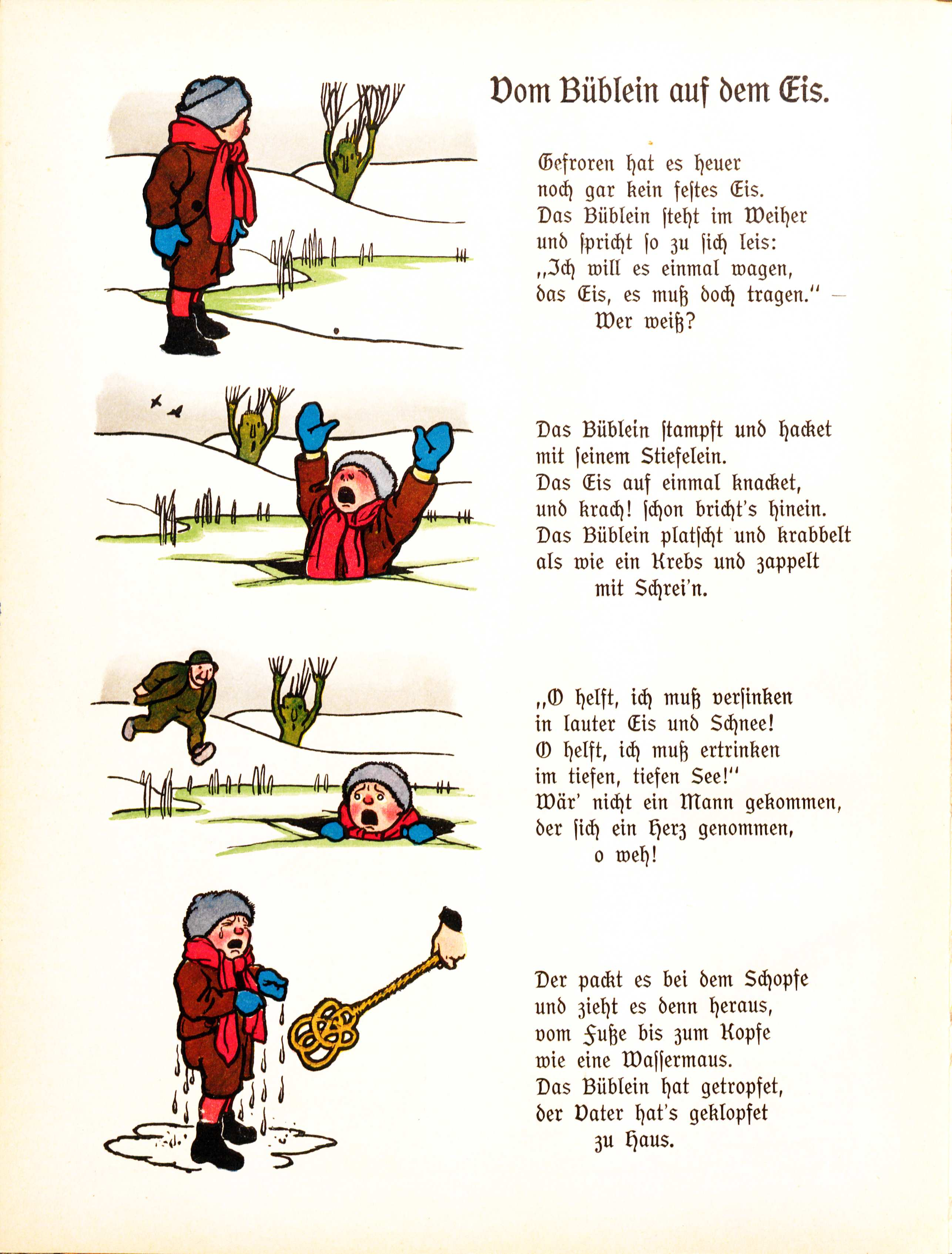 Friedrich Wilhelm Güll Vom Büblein auf dem Eis Zeichnungen Gertrud Caspari